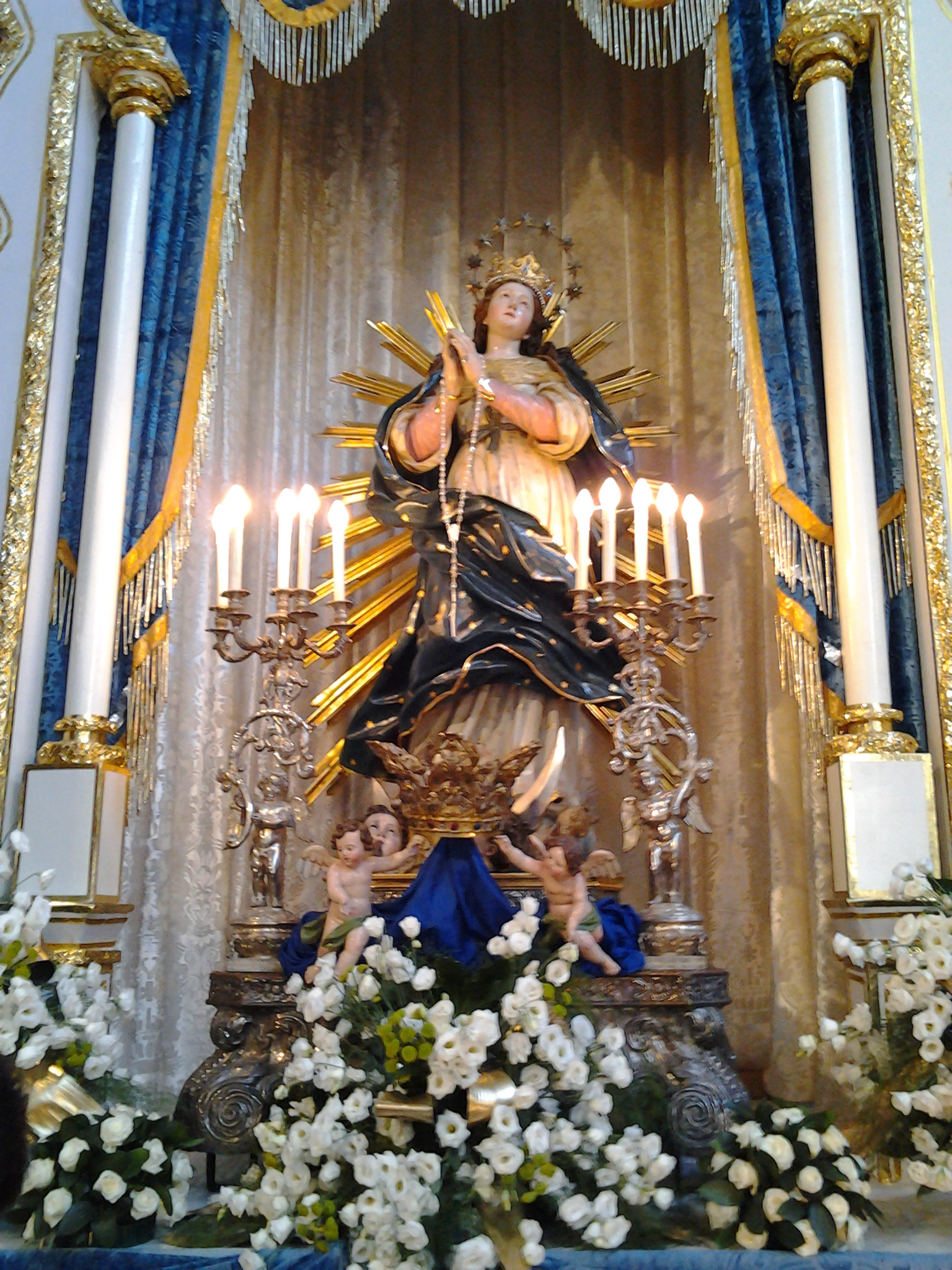 Madonna Assunta Di Avellino